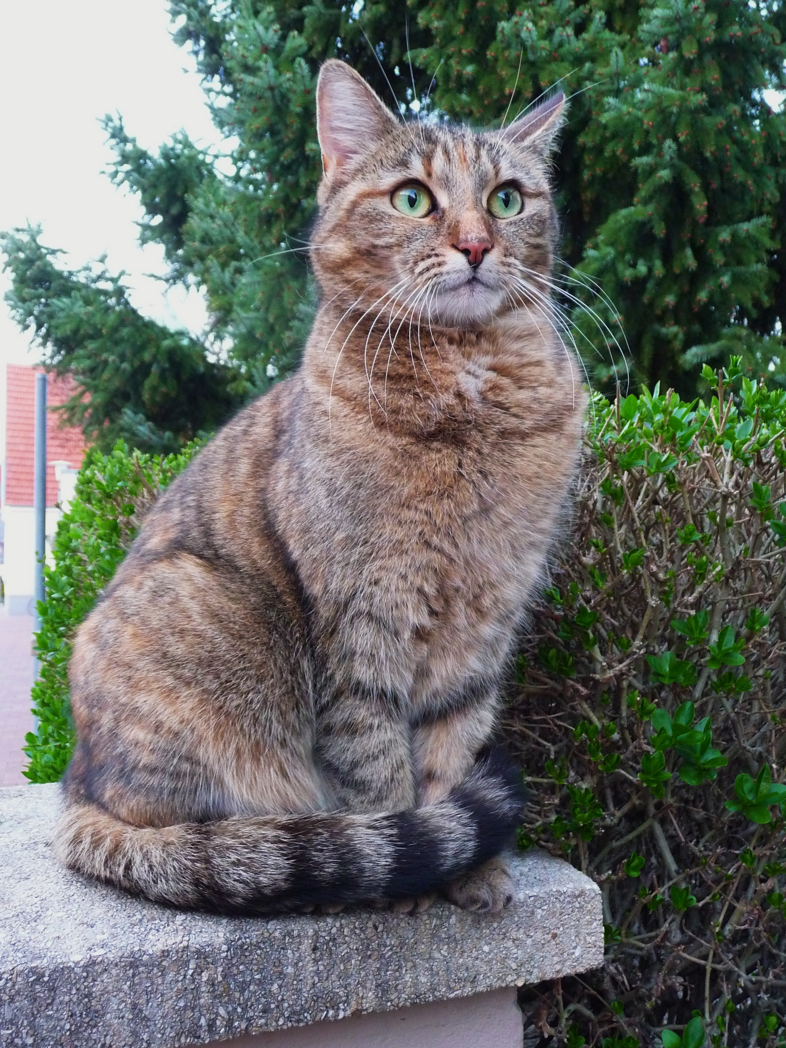 Dreifarbige Katze mit leuchtend grünen Augen, fotografiert in Baden-Württemberg, Deutschland)